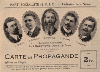 Carte de propagande aux élections législatives de 1919 par la SFIO de la Nièvre. Avec : J. Locquin, Dr Émile Bramard, E. Bondoux, H. Gamard, E. Laurent.